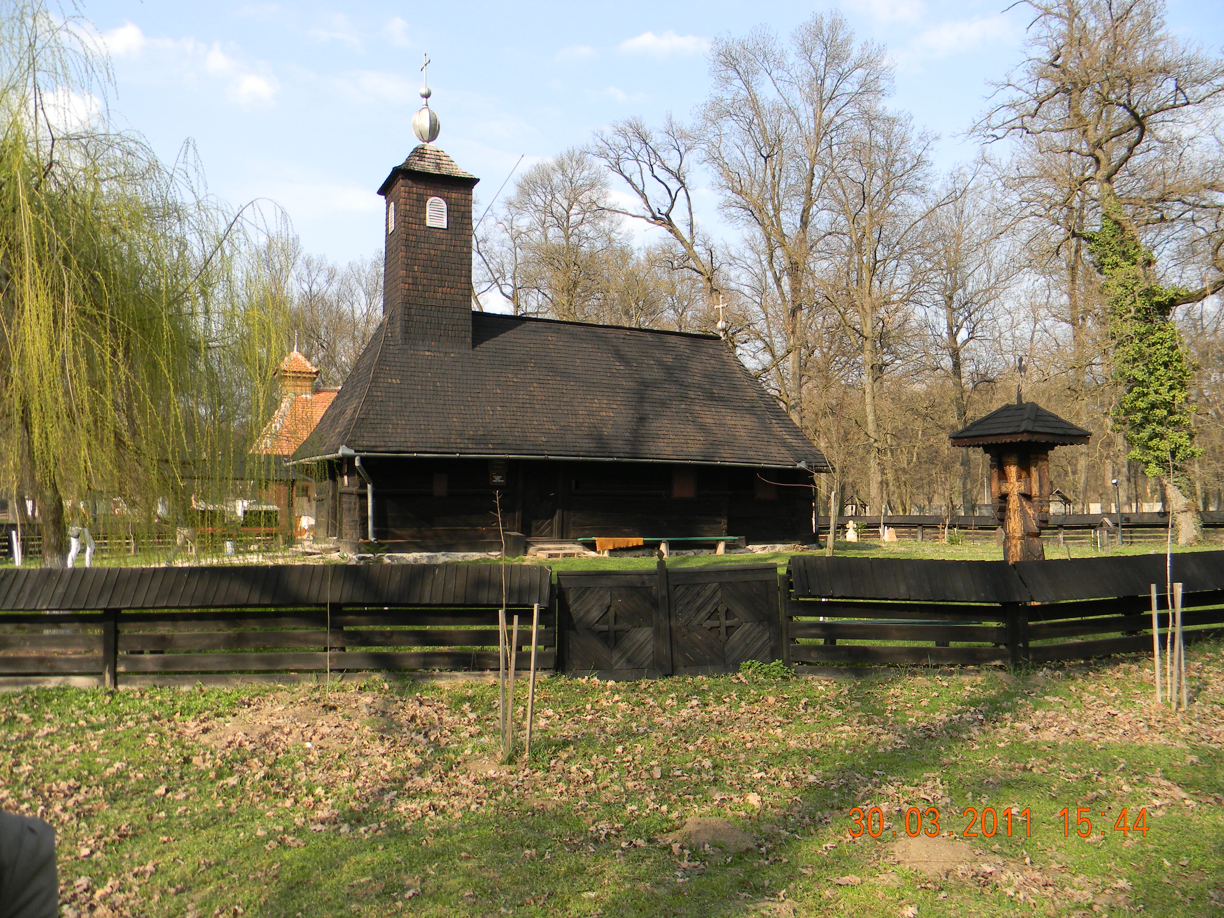 biserica din lemn din Topla (Muzeul Satului Banatean - Padurea Verde)